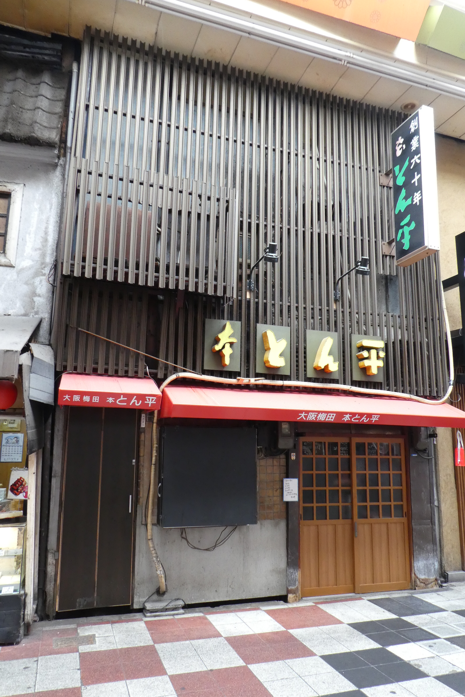 大阪市北区 東梅田 本とん平（休業日）